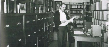 CC-Archiv